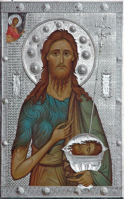 Иоанн Креститель, икона. Серебряная басма, чеканка. Бигорский монастырь (Македония)